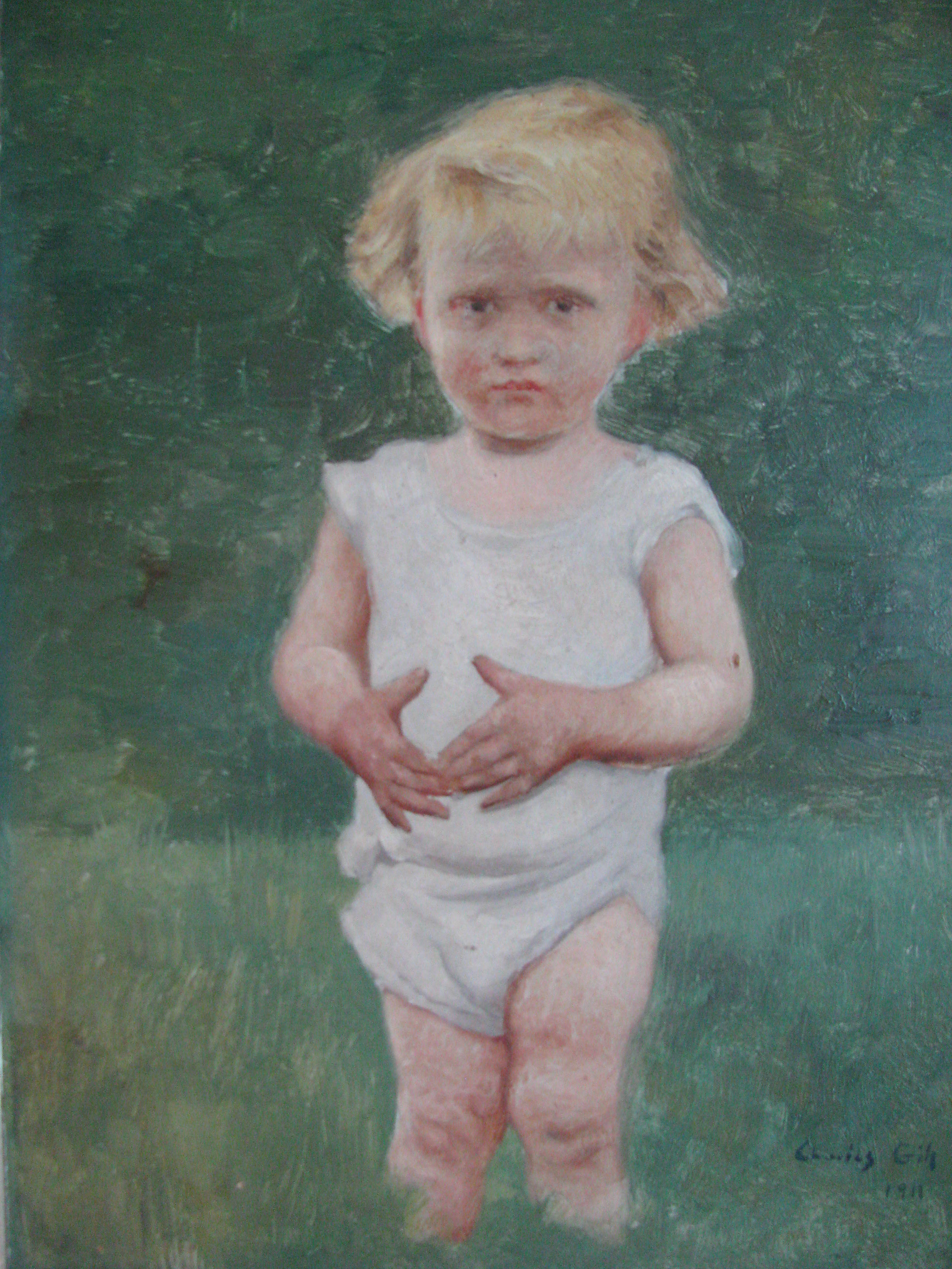 Enfant Jean-Paul Bélanger peint à l'âge de 21 mois. Le fond de paysage représente un pré à l'orée d'un boisé. Photographie de la peinture exécutée à la lumière du jour.